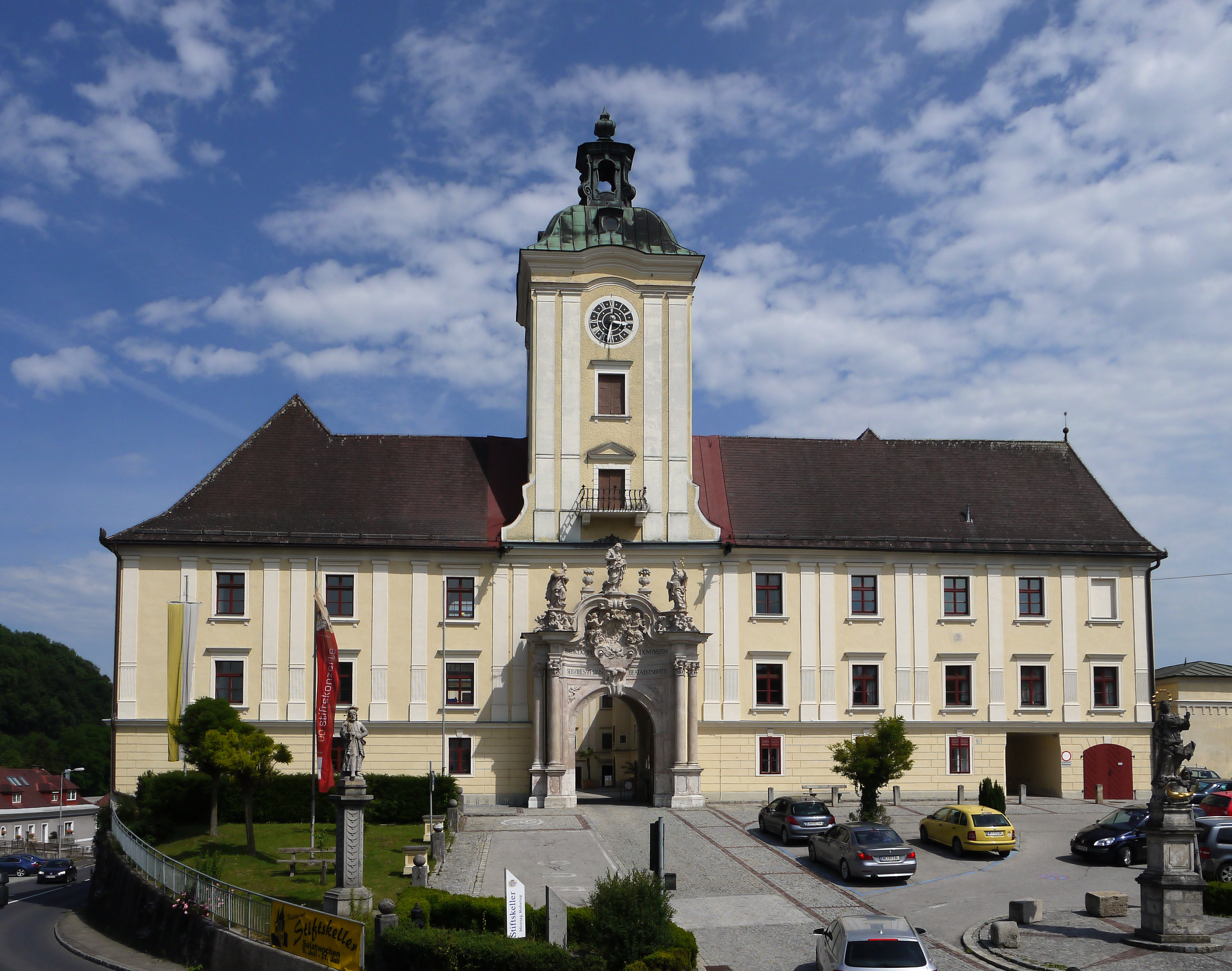 Gesamtanlage Stift Lambach